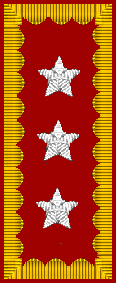 Presilla de General de Diviisón del Ejercito de Chile